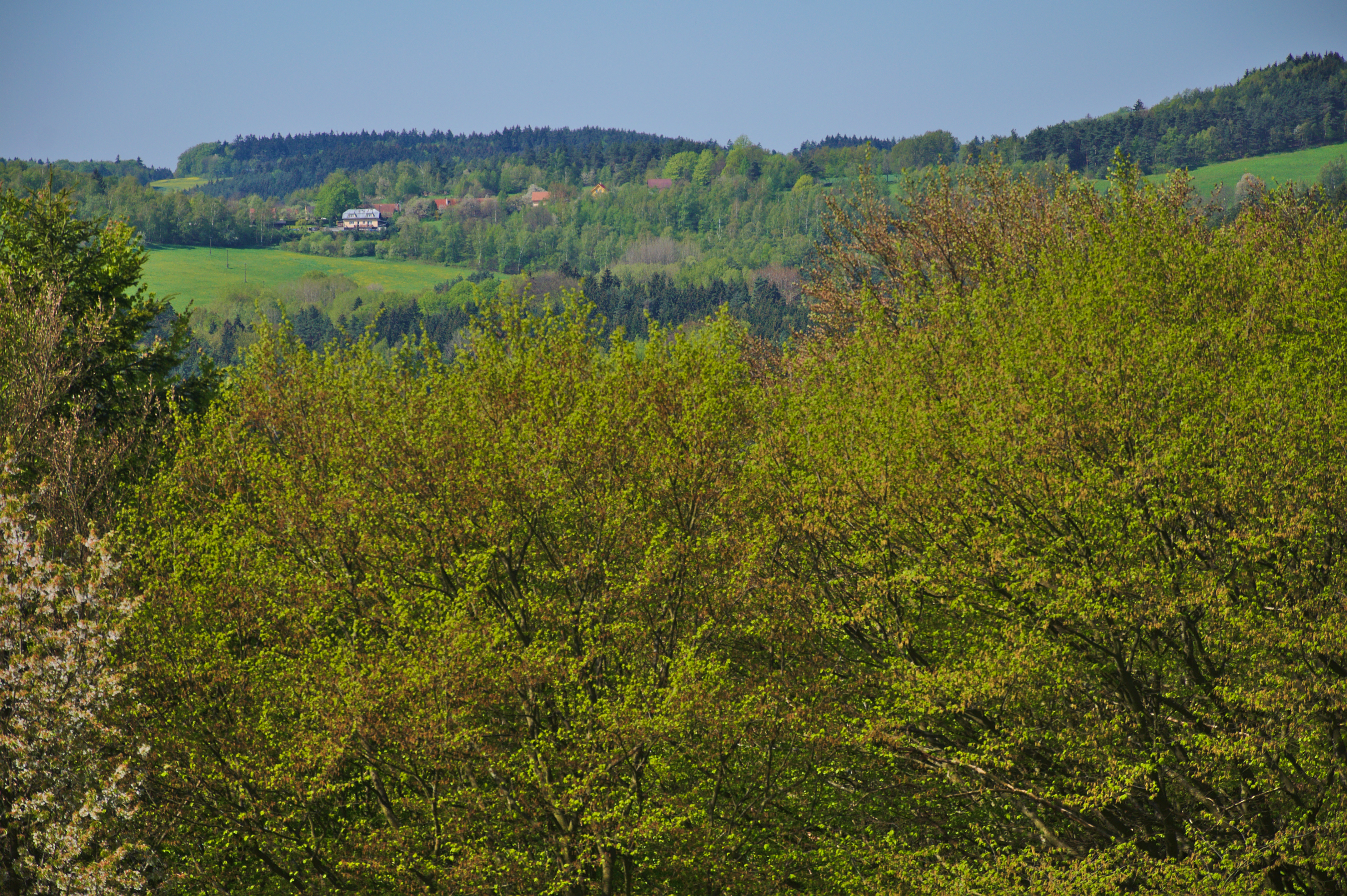 Kovářová z Kopicova vrchu, Ujčov, okres Žďár nad Sázavou